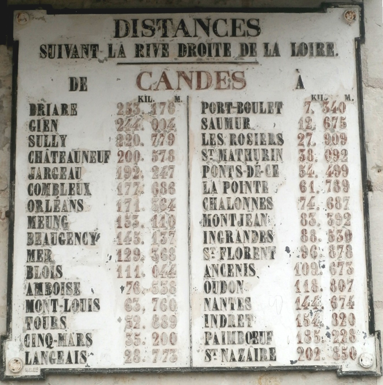 Plaque indiquant des distances de navigation fluviale